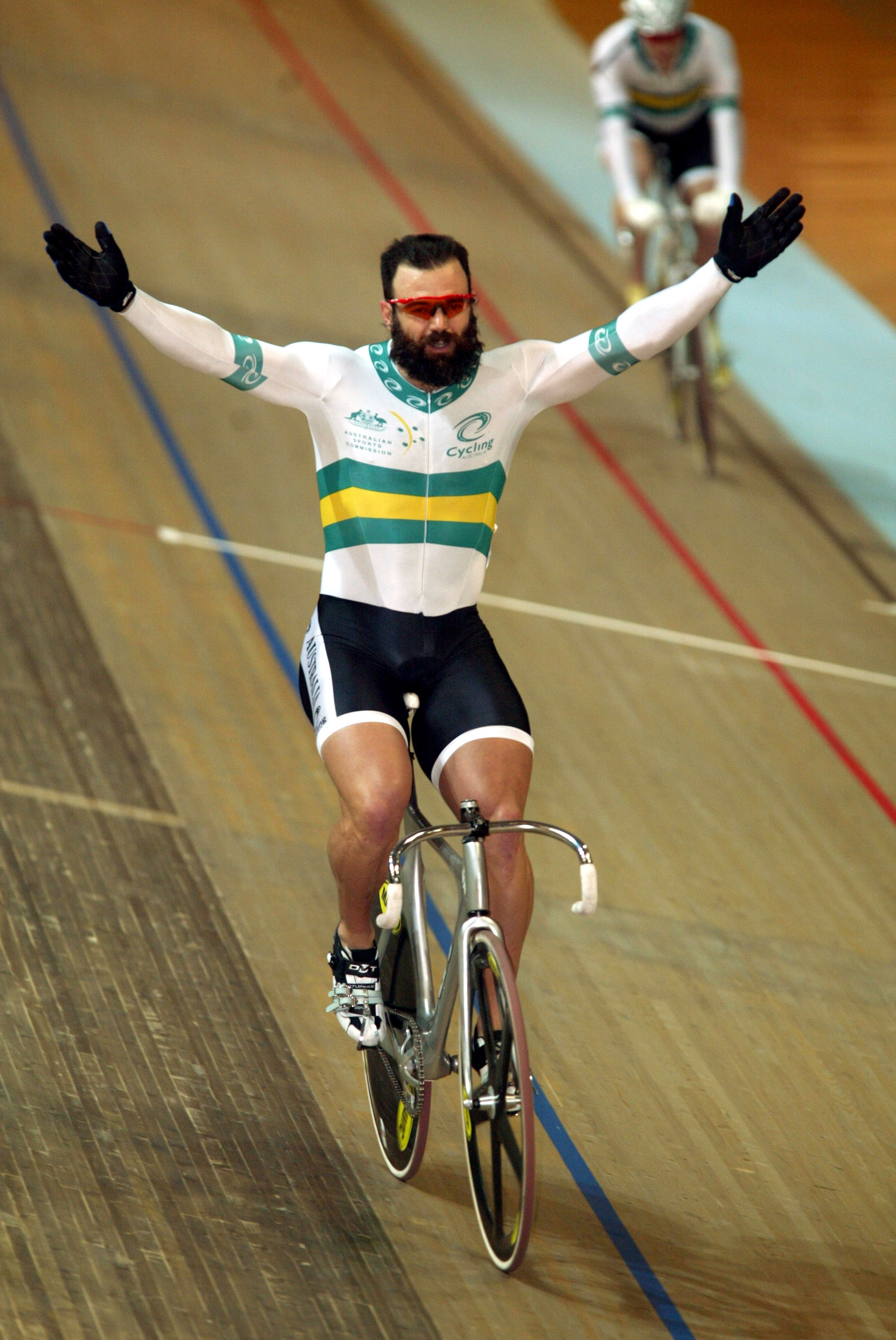 Sean Eadie, australischer Radrennfahrer, als Sprint-Weltmeister 2002 in Kopenhagen